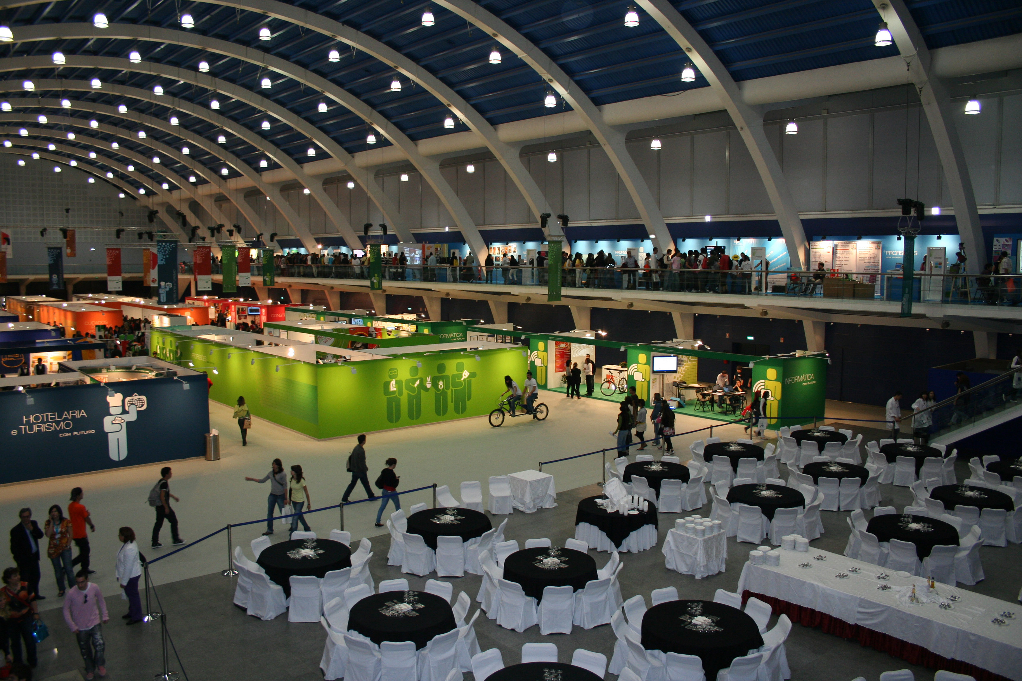 Feira Internacional de Lisboa (FIL) / Centro de Congressos de Lisboa This file was uploaded for Wiki Loves Monuments in Portugal with the unique identifier 97014406.